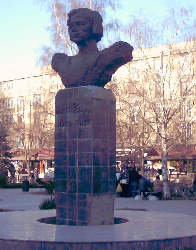 Bust în Ploiești dedicat lui Nichita Stănescu